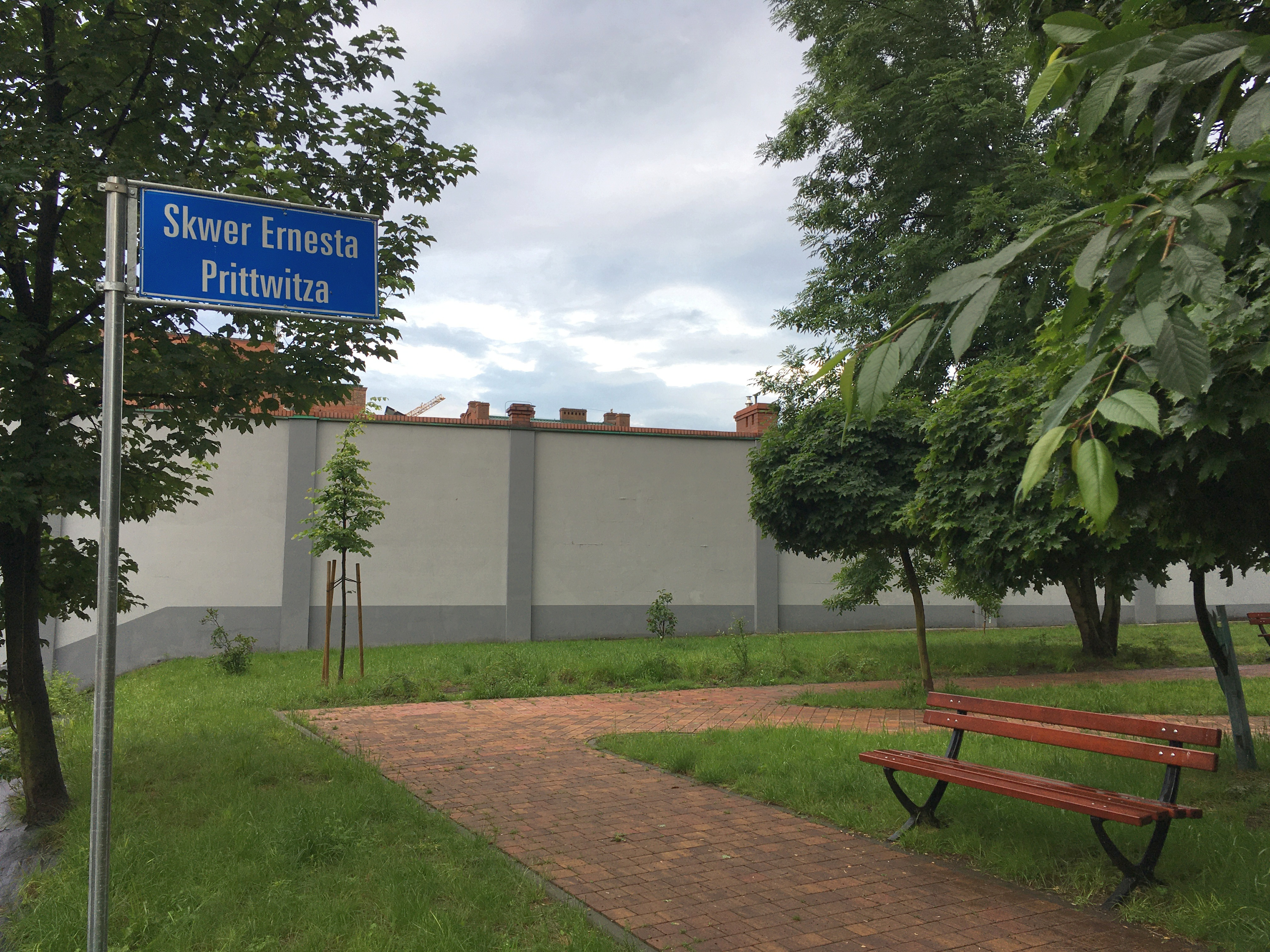 Skwer Ernesta Prittwitza w katowickiej dzielnicy Szopienice.